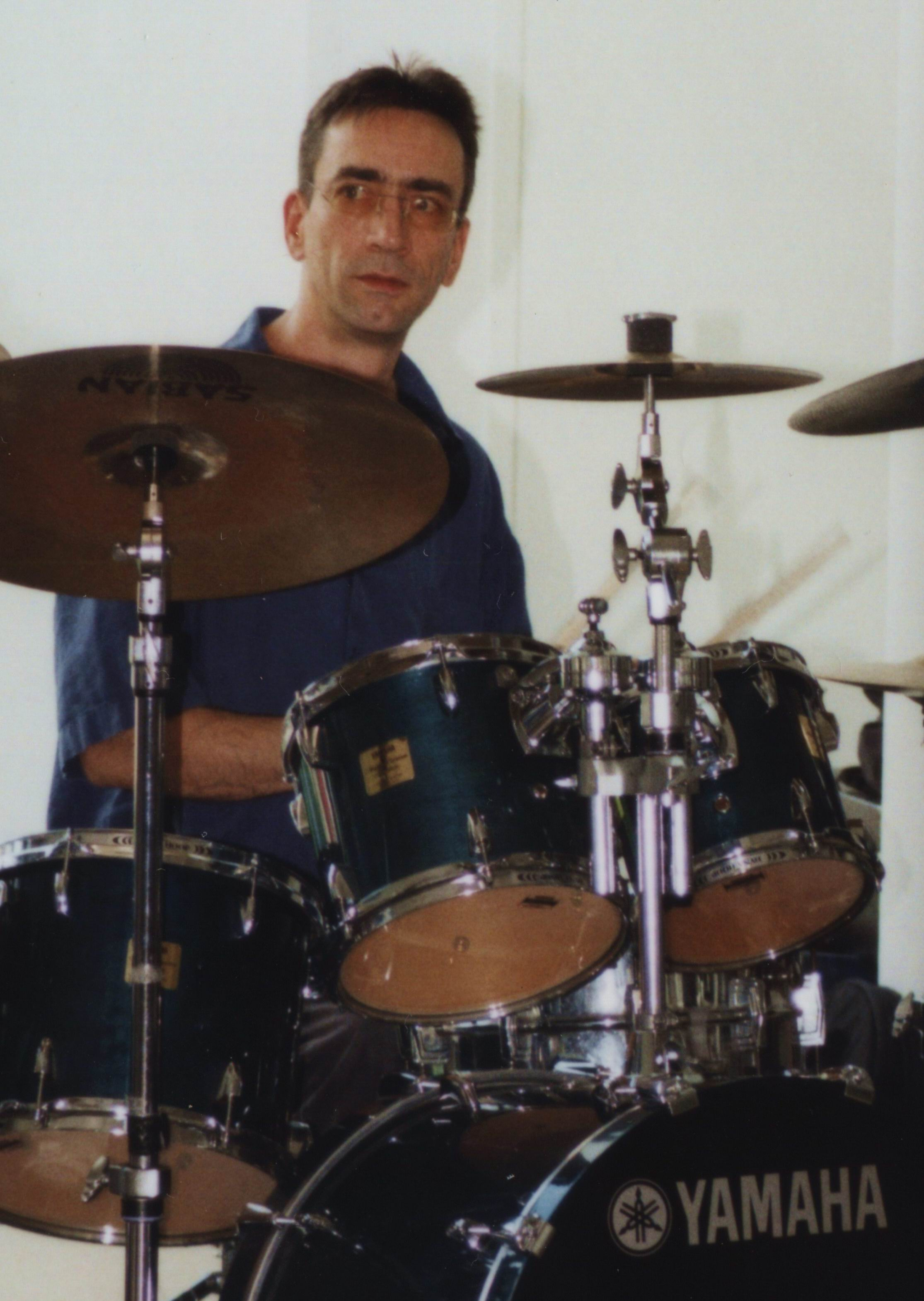 Hardy Fischötter bei einem Konzertauftritt der Susan Weinert Band in Saarbrücken 2002